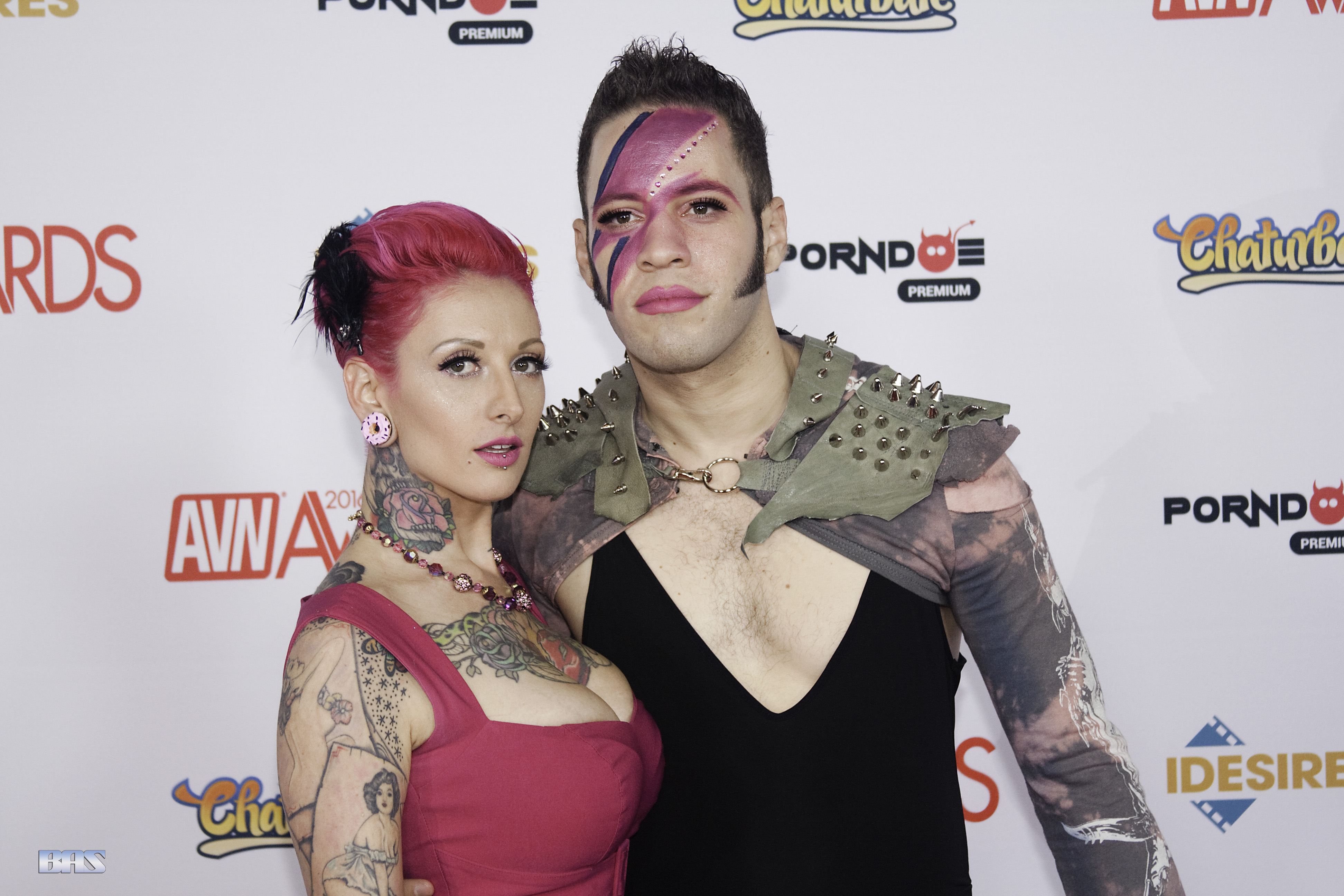 AVN16_1047bas